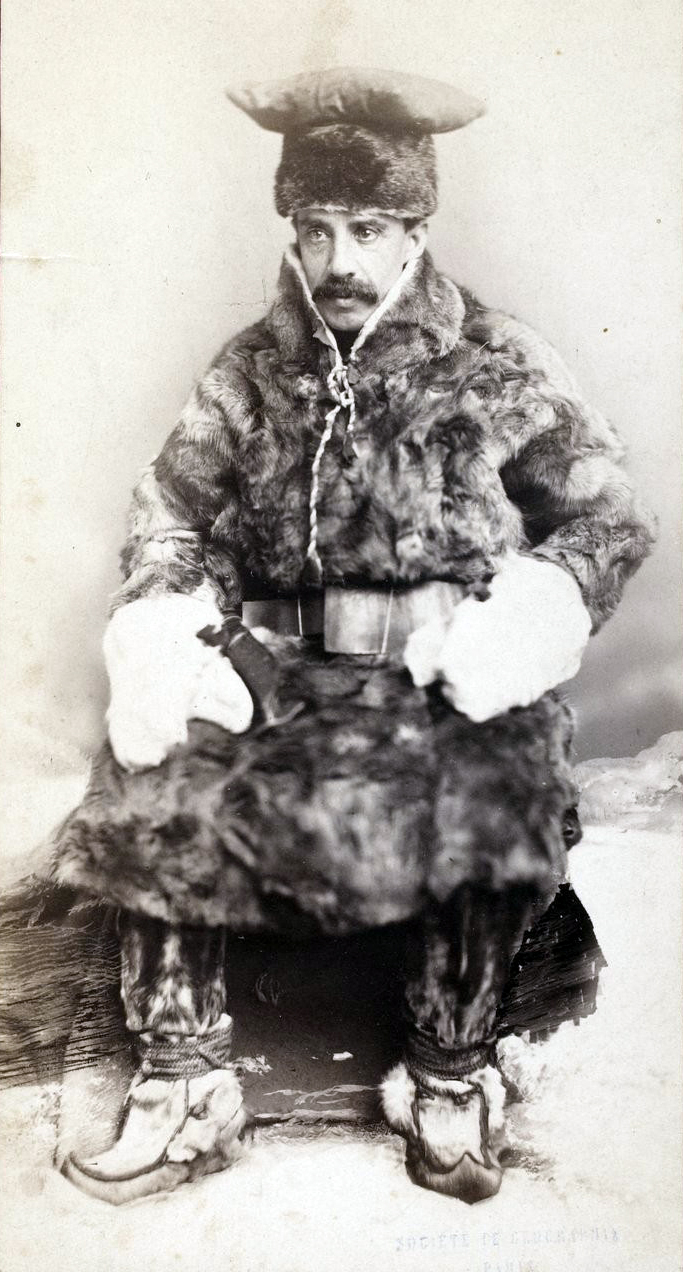 Photographie dédicacée. Mention au verso : "In remembrance of the pleasant days spent together in merry England and in la belle France", datéé août 1881. Souscription précisant que la photographie a été offerte à la Société de géographie en 1884.